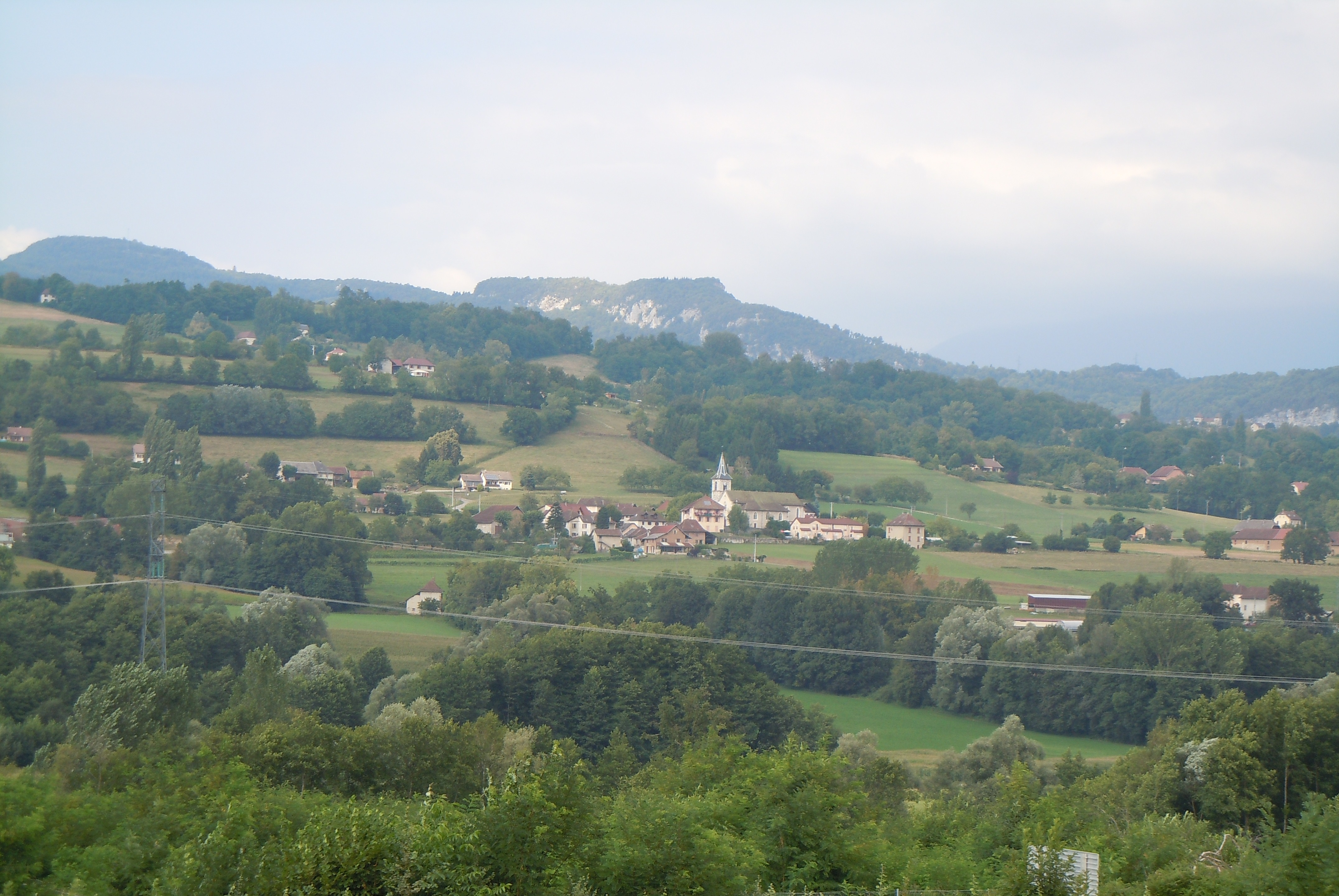 Avressieux - Vue Générale - Savoie